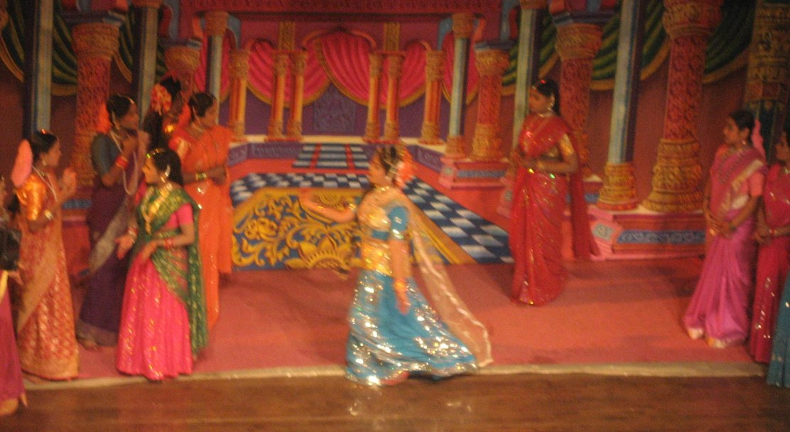 Ghatothkaza acting as Sasirekha teases her maids with man like gestures